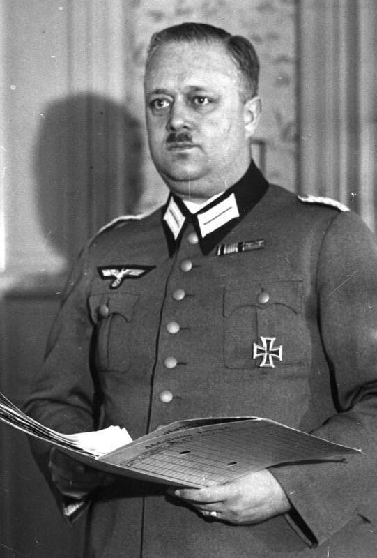 Major [Hasso] von Wedel spricht über "Aufbau der Wehrmacht" in der Hochschule für Politik. Major von Wedel, der Leiter der Pressetruppe im Oberkommando der Wehrmacht sprach am heutigen Mittwochabend (23.11.1938) im Schinkelsaal der Hochschule für Politik zu dem Thema "Aufbau der Wehrmacht". Bild-Nr. A 62740 23.11.1938 Bildb[erichter]. Stiehr Schr. PBZ [Scherl Bilderdienst]